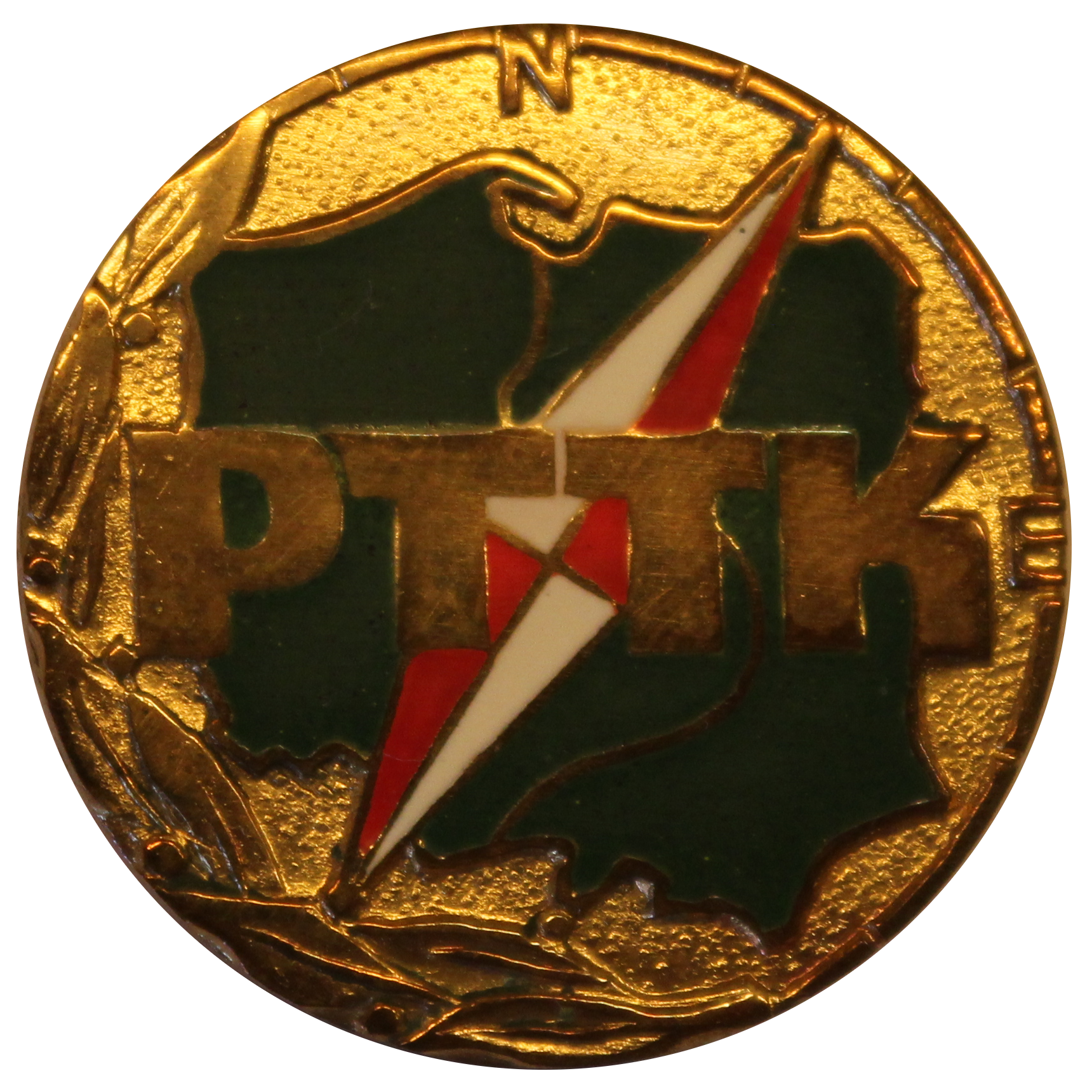 Złota Honorowa Odznaka PTTK